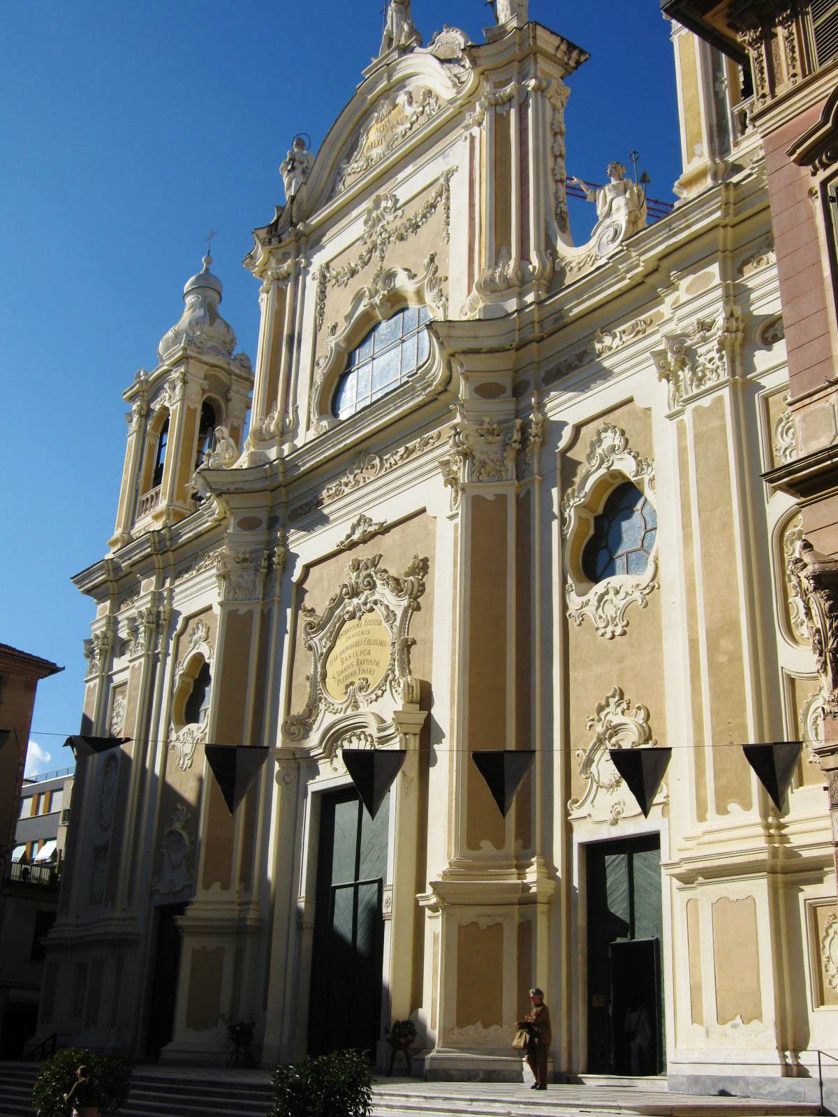 Finale Ligure, Parochie van St. Johannes de Doper van de Heilige Maal.